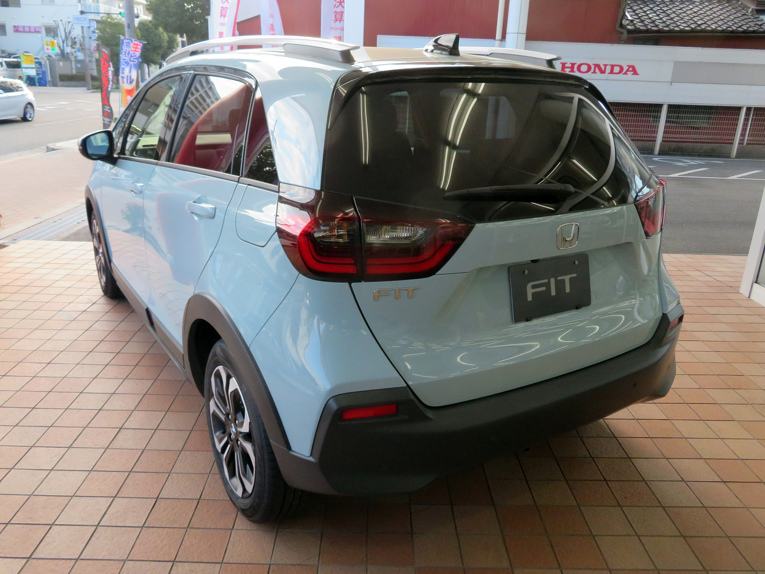 6BA-GR5型ホンダ・フィットCROSSTAR 2WDをリアから撮影。